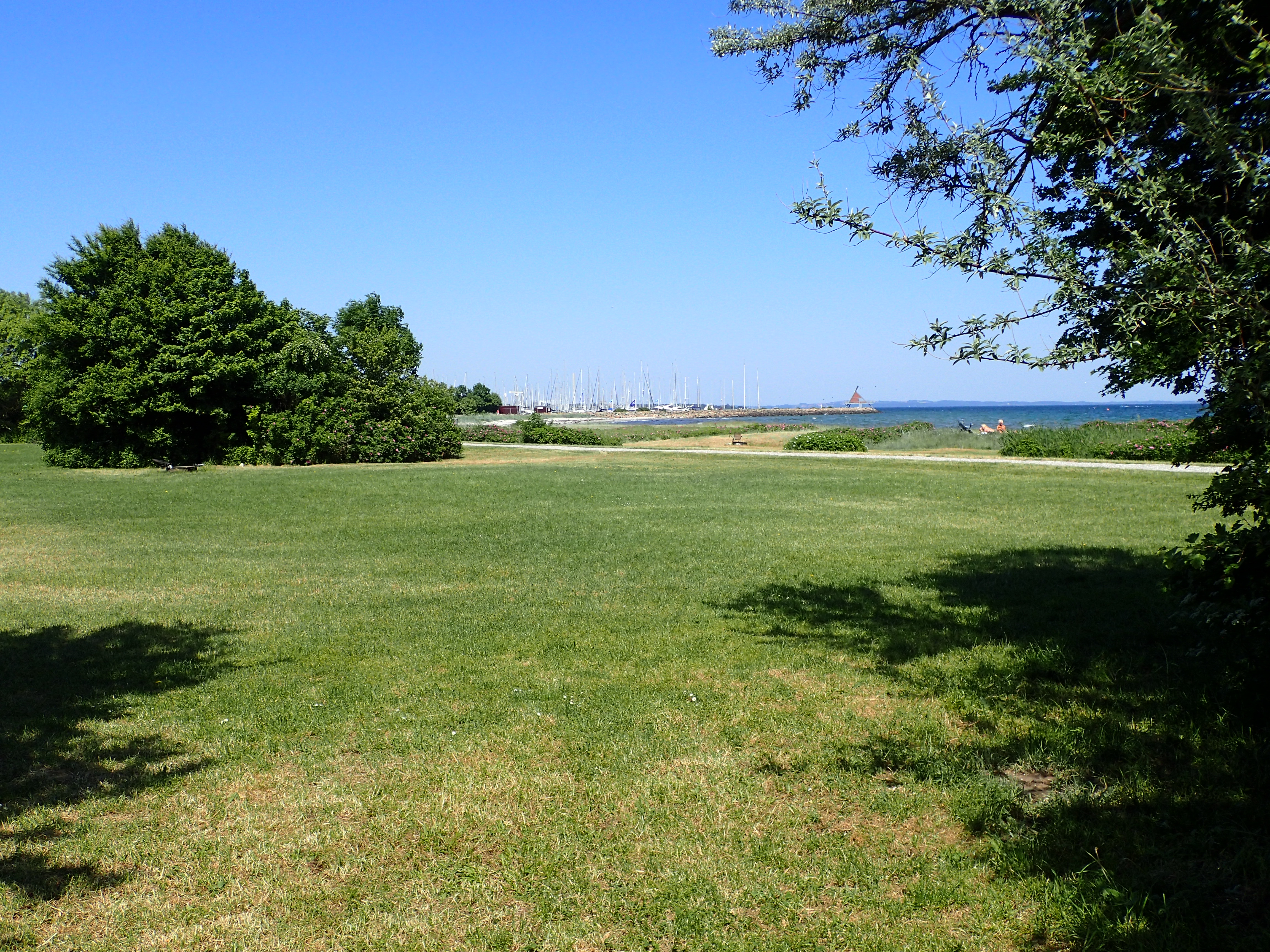 Åkrogen, fra den sydlige del. Egå Marina i horisonten.